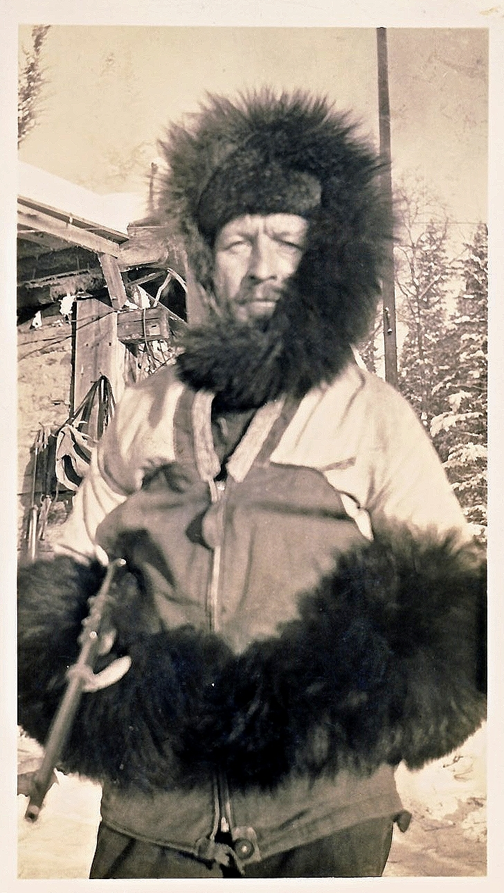 Naumann Georg mit Pelz 2